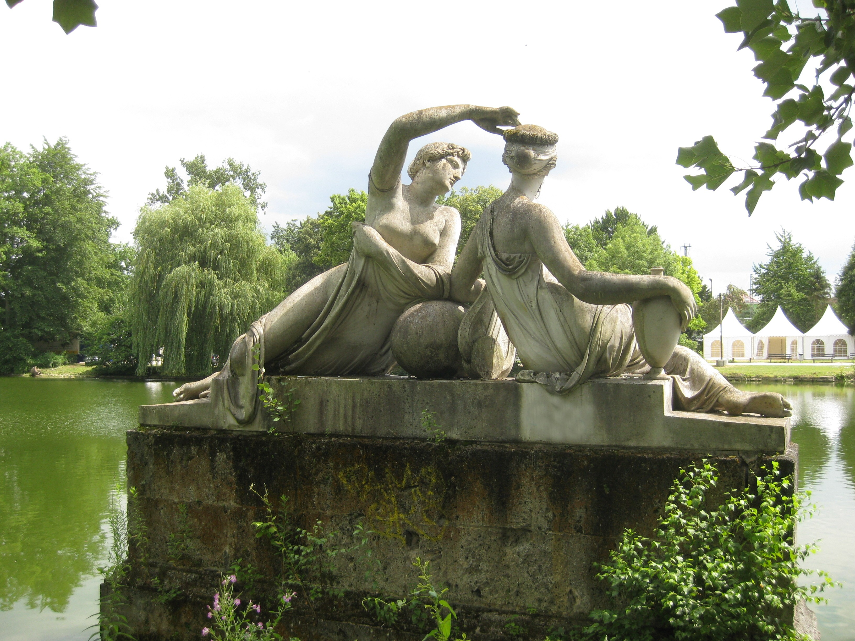 Johann Heinrich Dannecker: Wasser- und Wiesennymphe, Rückseite. Steingußkopie der Ausführung von Friedrich Distelbarth (1810-1815) von dem verstorbenen Restaurator Hans Volker Dursy aus Ladenburg (1986), Tübingen, Anlagenseee